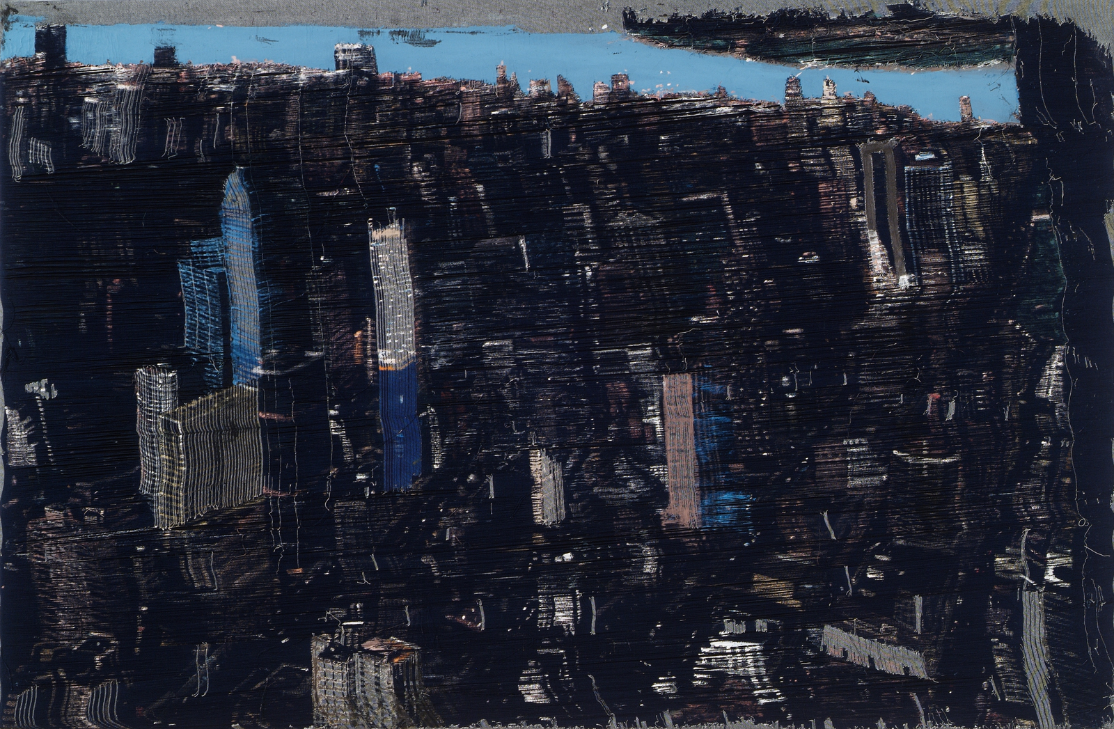 František Matoušek, Wen Kroy, akryl na párané riflovině, 90 X 140 cm (2004)